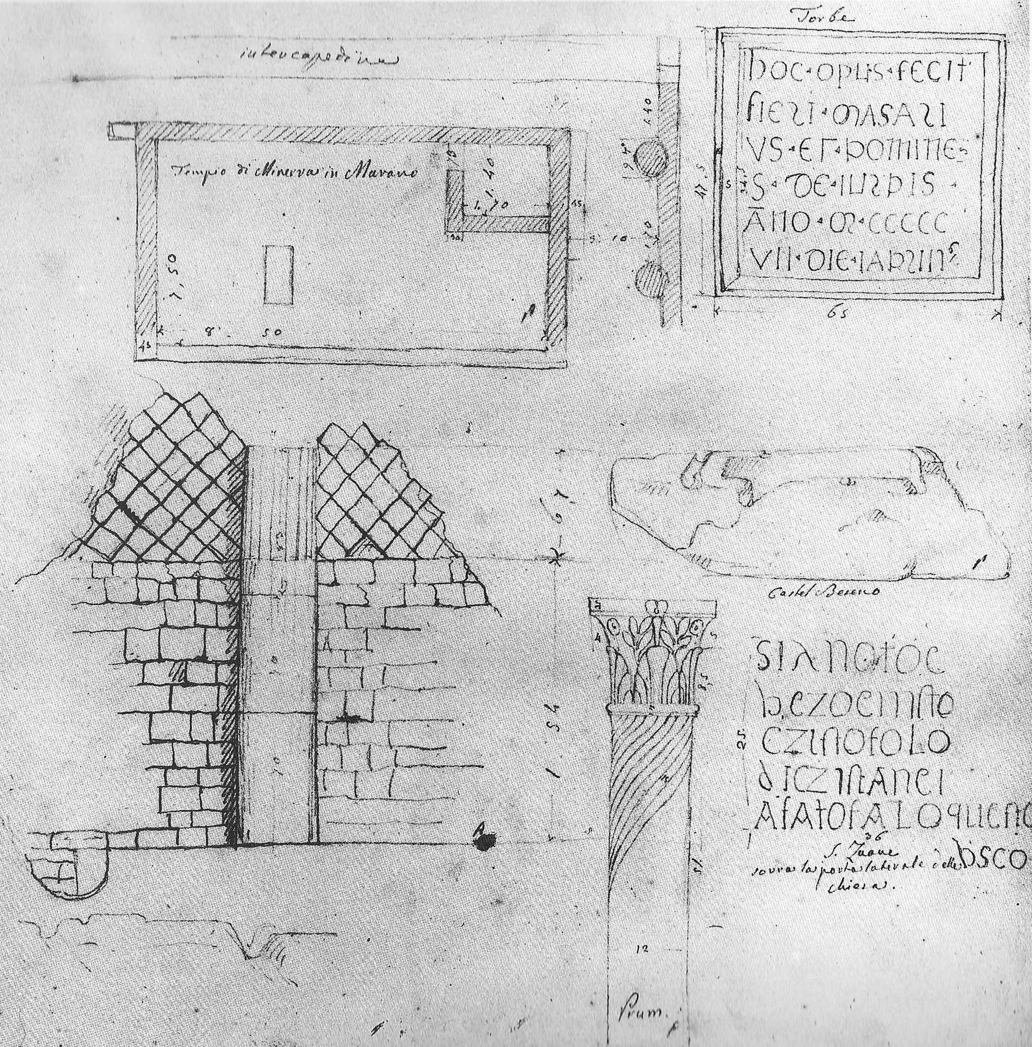 Pianta del tempio di Minerva, scoperto nel 1835, a Marano di Valpolicella, in località Castelon